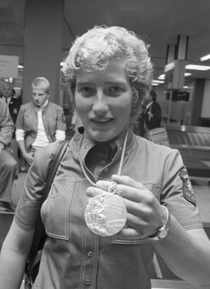 Mieke Jaapies. Links nog zichtbaar: Hansje Bunschoten.